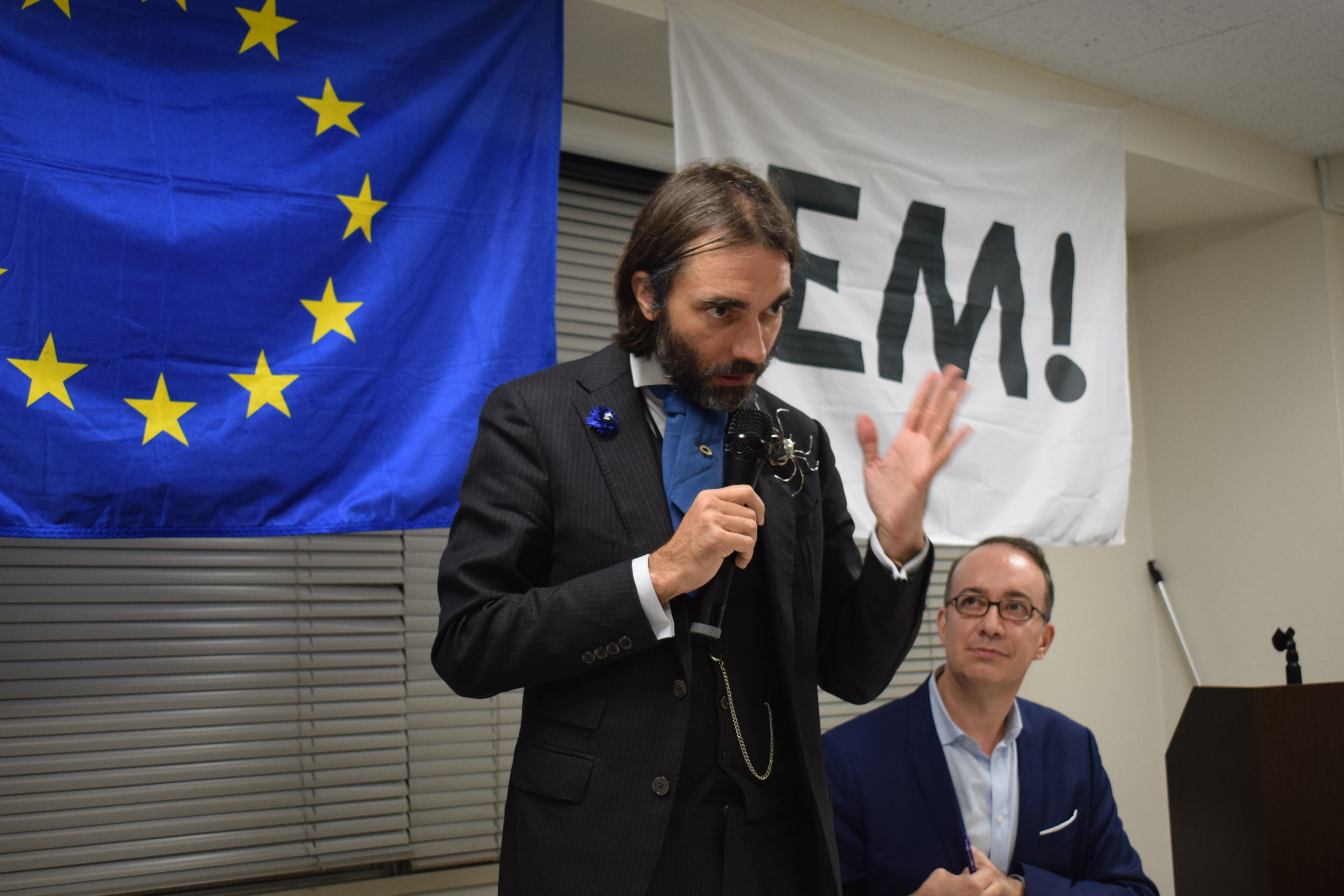 Réunion publique de La République En Marche ! Japon, avec le député Cédric Villani le jeudi 22 novembre de à Akasaka, Tokyo